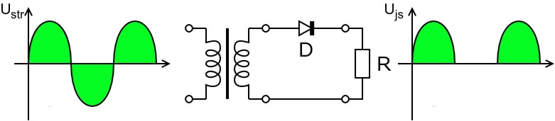 Jednocestný usměrňovač